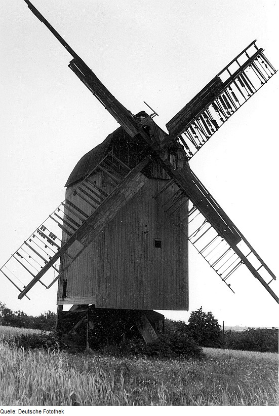 Original image description from the Deutsche Fotothek Völpke-Badeleben. Bockmühle (um 1980/85 eingestürzt)